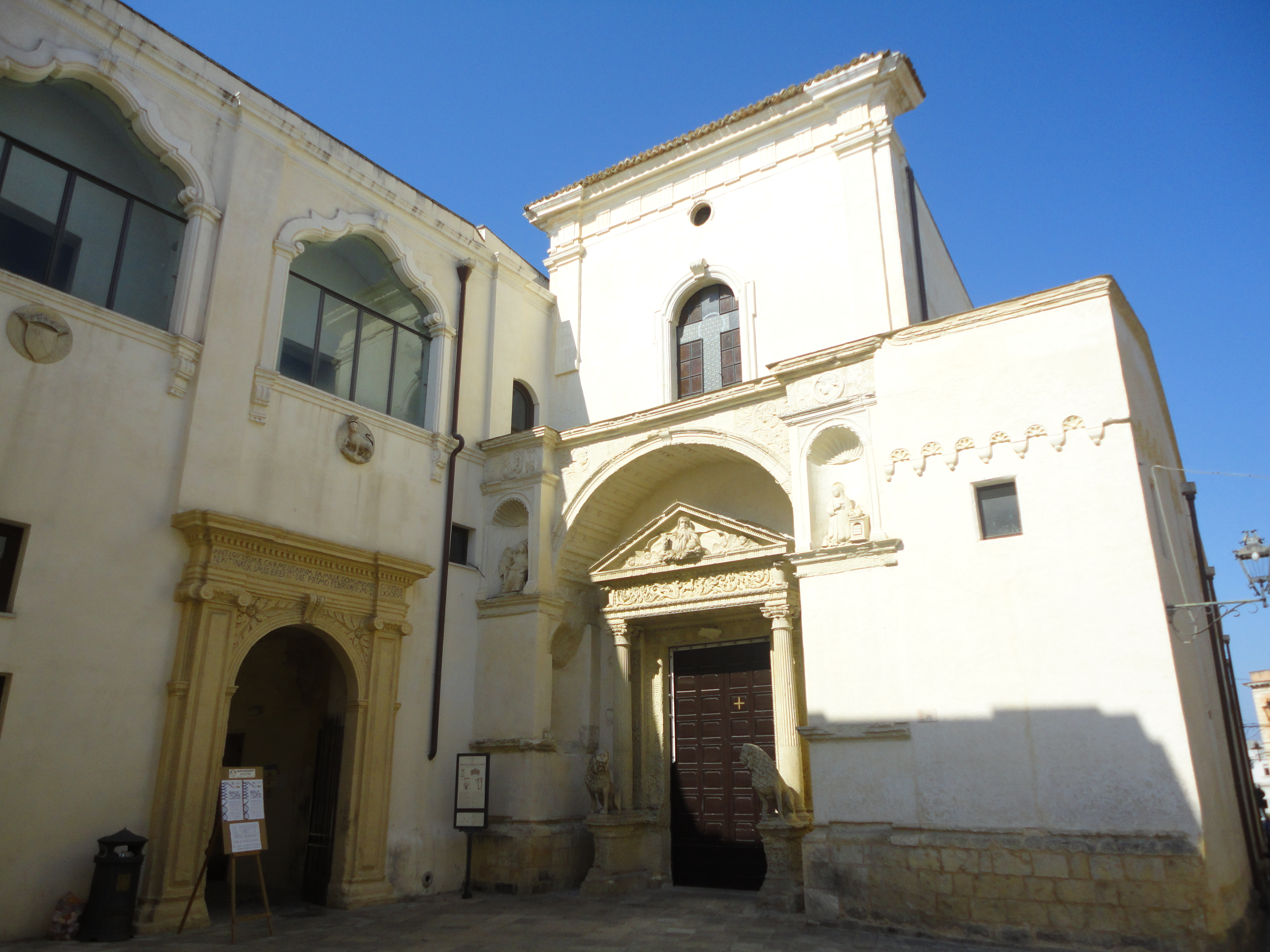 Chiesa della Madonna del Carmine Nardò, Lecce